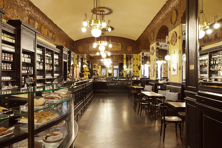 Interno del bancone